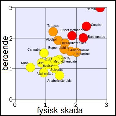 En rationell skala för att bedöma skadan av läkemedel. Datakälla är 24 mars 2007 Artikel:Nutt, David, Leslie A King, William Saulsbury, Colin Blakemore. "Development of a rational scale to assess the harm of drugs of potential misuse" The Lancet 2007; 369:1047-1053. (PMID 17382831; Jag bara översatte den till svenska.